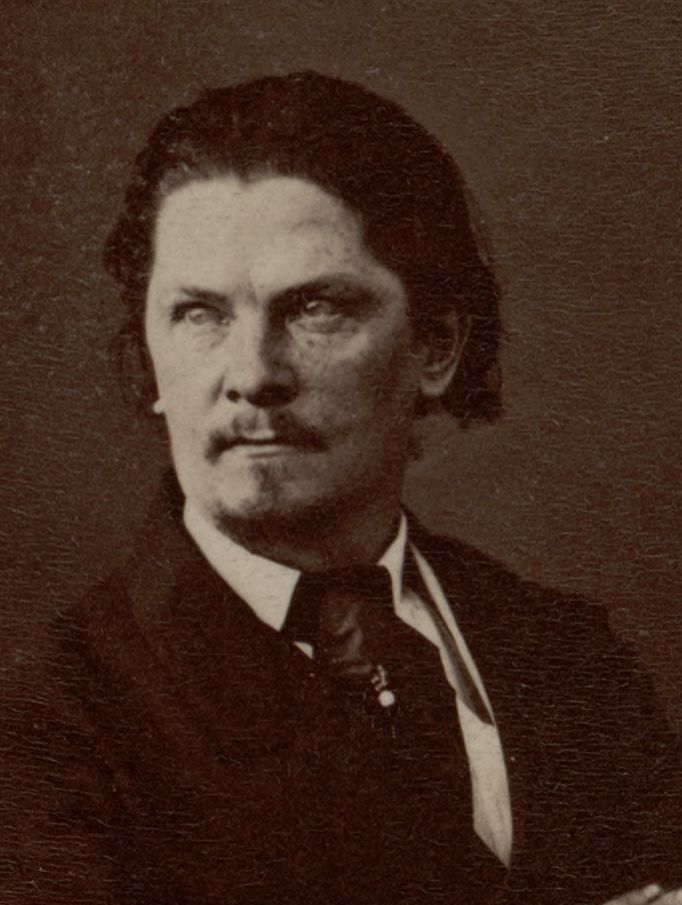 Portrait d'Alexandre Flan